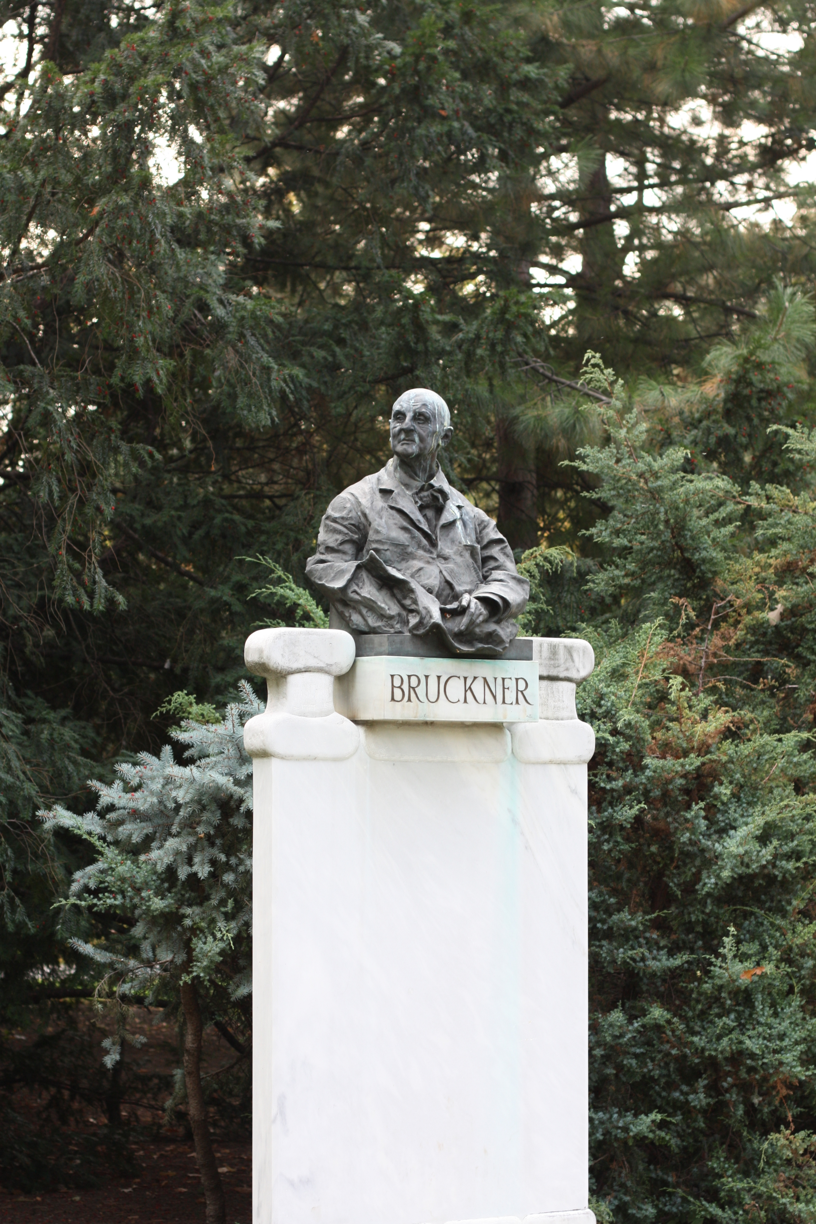 Wien, Stadtpark, Anton-Bruckner-Denkmal, Bronzebüste von Viktor Tilgner, 1891–1899. Sockel neu.